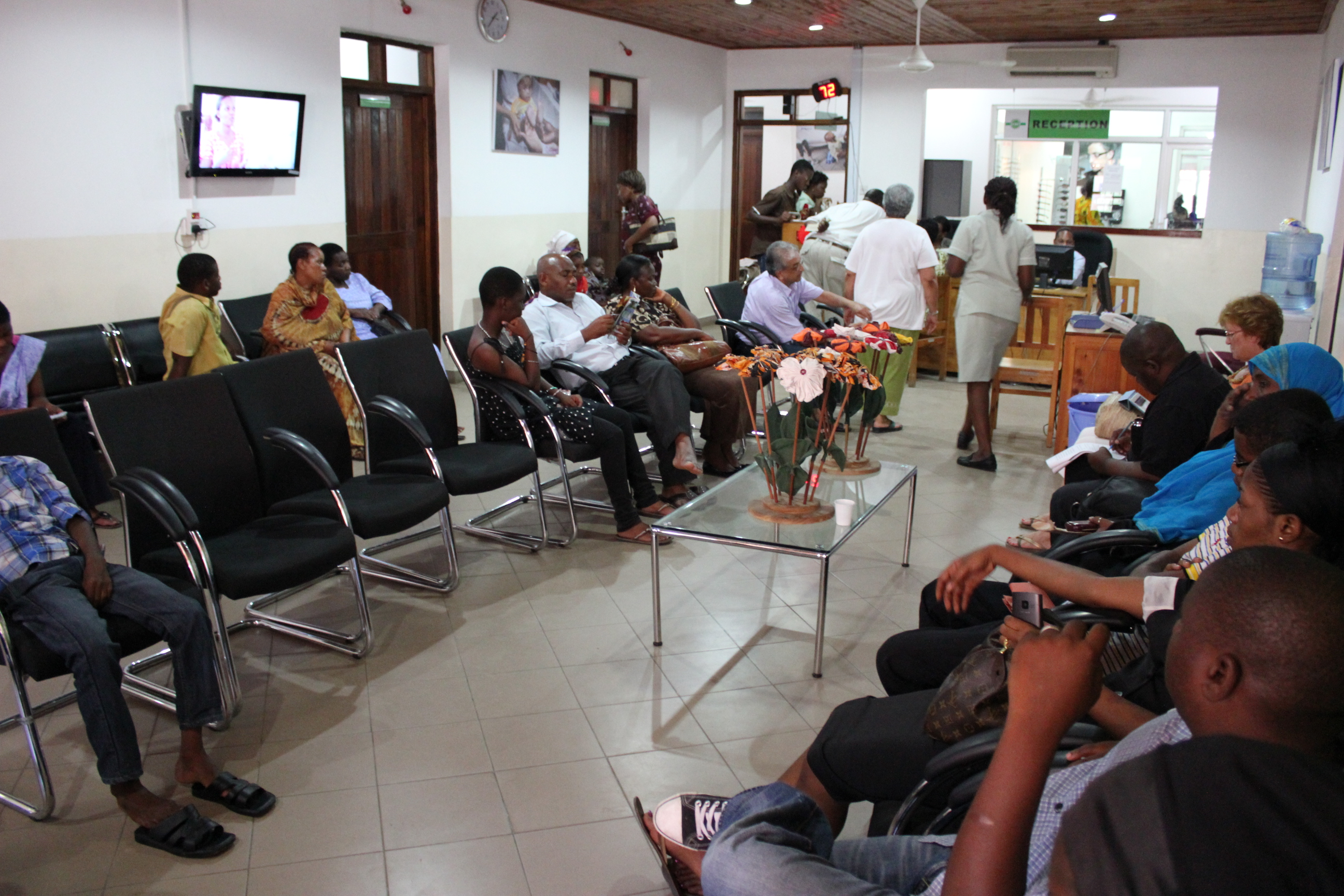 CCBRT Disability Hospital waiting room 1